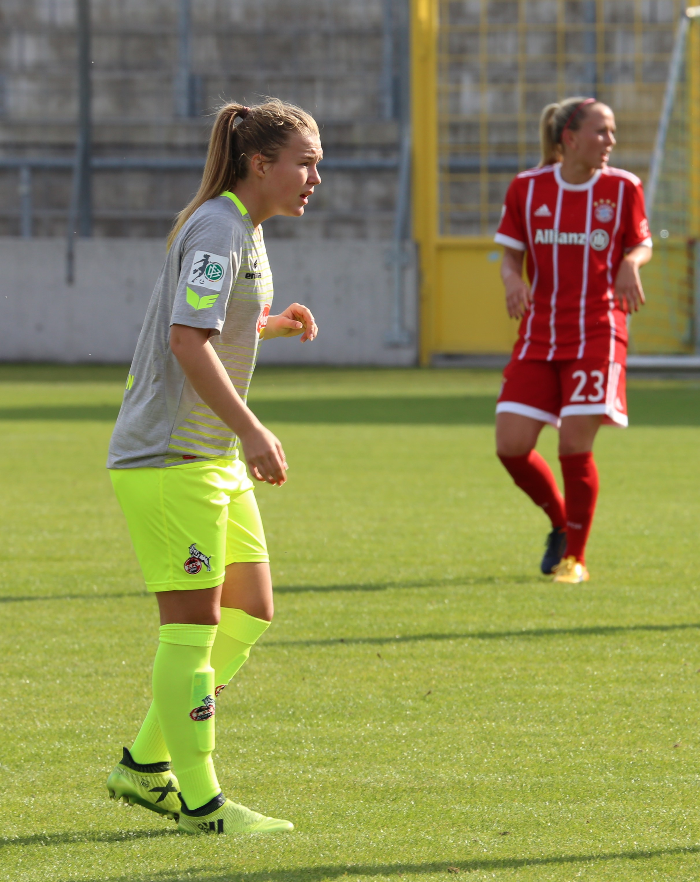 Ann-Kathrin Vinken, 1. FC Köln, beim Frauen-Bundesliga-Spiel FC Bayern München gegen 1. FC Köln am 24. September 2017 im Stadion an der Grünwalder Straße (Ergebnis war 2:0)